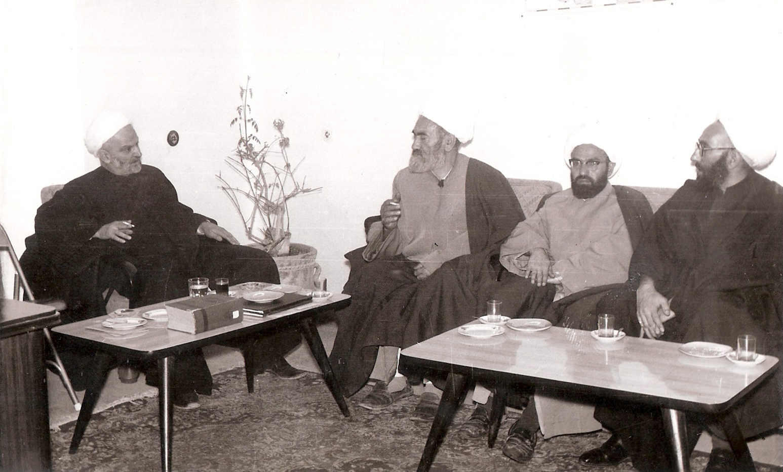 از سمت چپ، نفر اول : علامه محمدجواد مغنیه، نفر سوم : آیت الله محمد واعظ زاده خراسانی